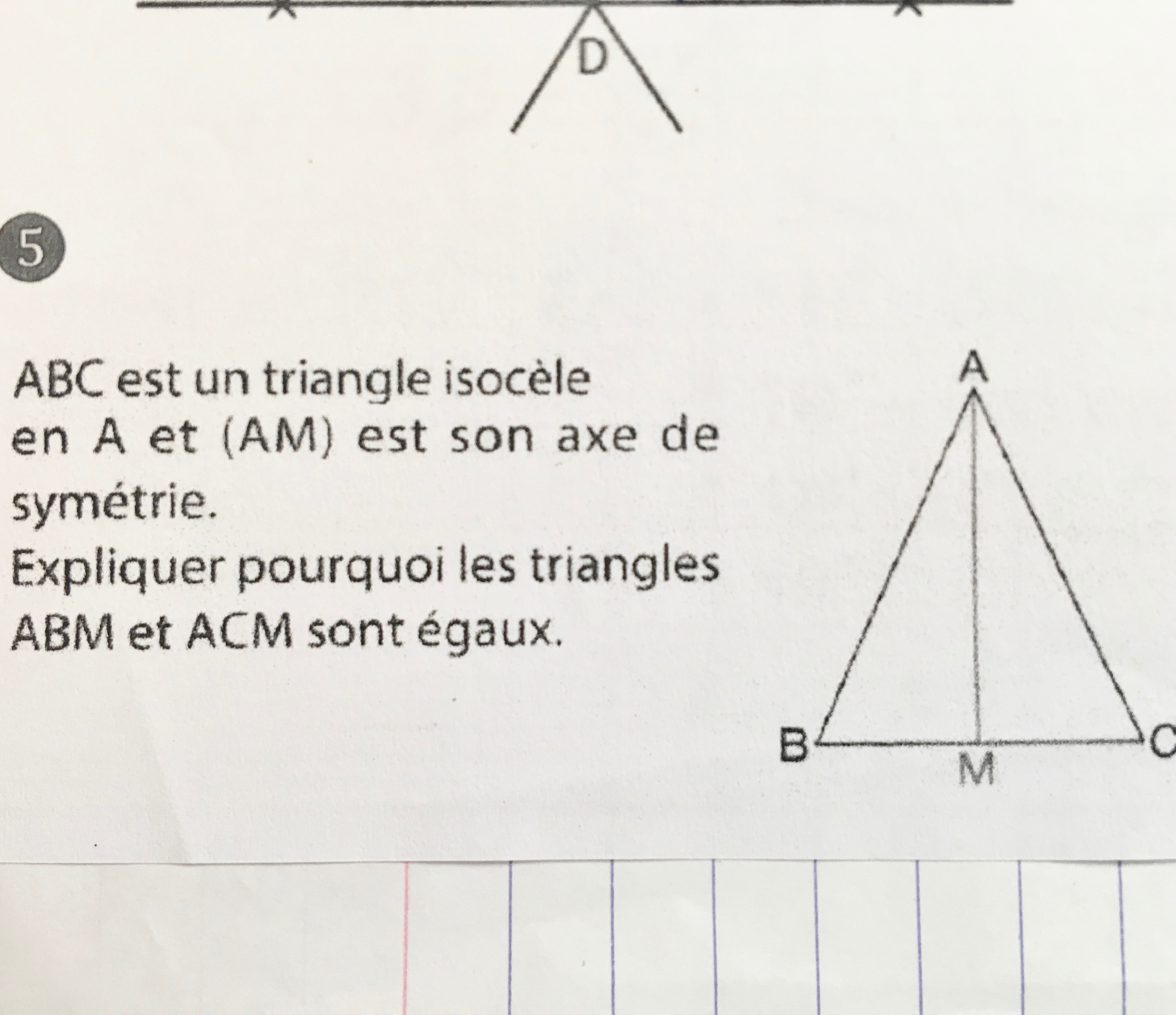 Je suis un petit collégien qui se noie dans des flots d'exercices inutiles donnés par une secte sadique appelée "Education nationale" !